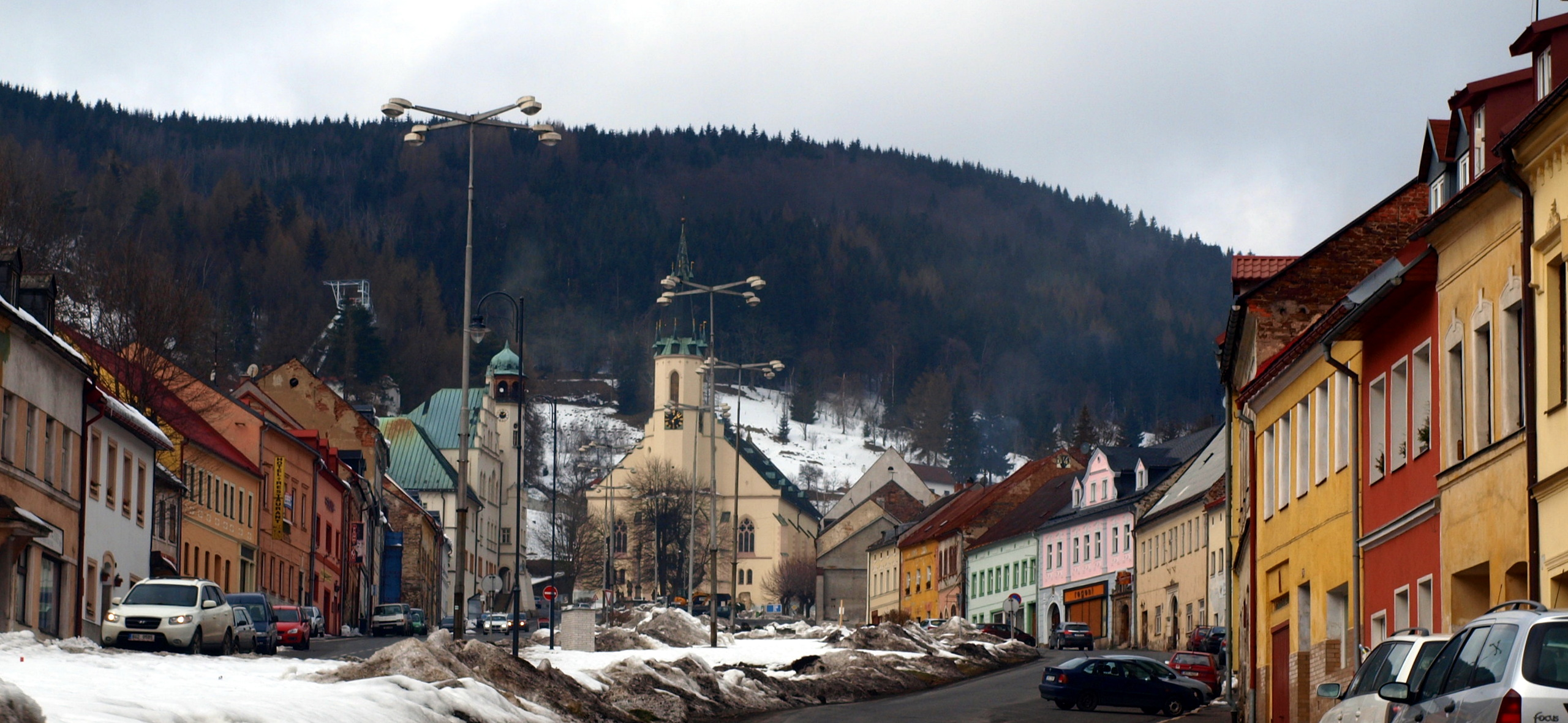 Jáchymov